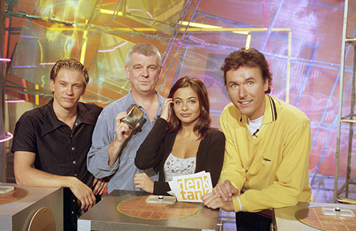 Setfoto's van Denktank: Ferry Somogyi, Frits Jansma, Georgina Verbaan & Kas van Iersel